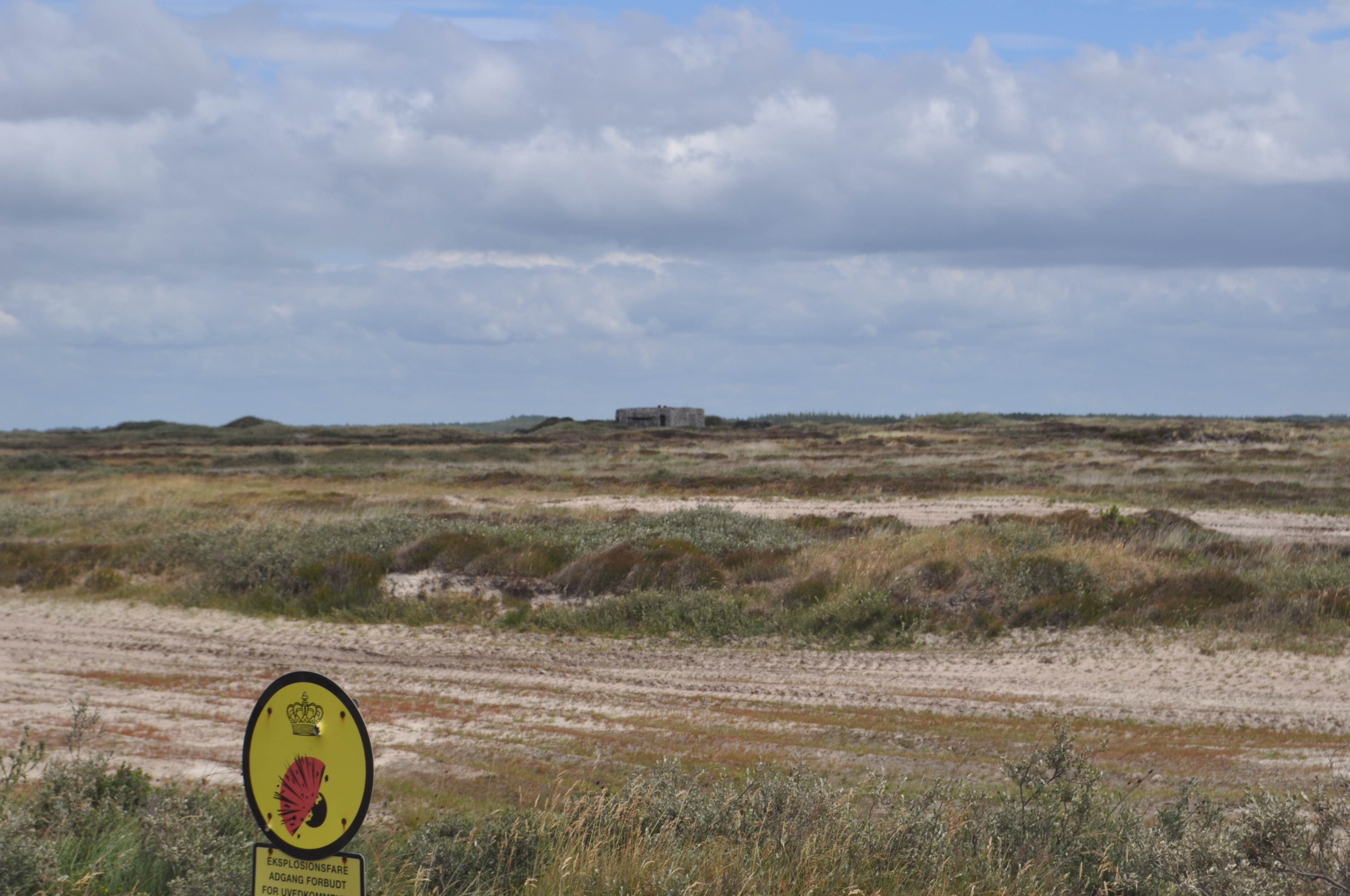 Heide im Schießplatz Oksbol - hinten Hinterlandbunker Atlantikwall